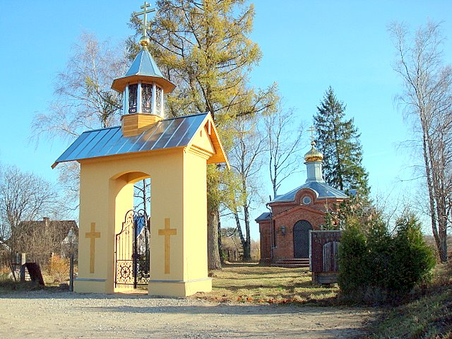 Церковь Св.Георгия в Гейсишкес